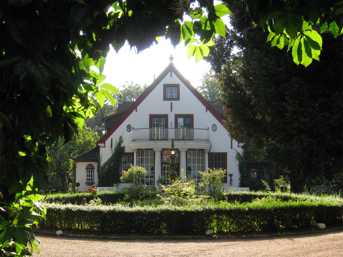 Gutshaus Hodenberg in Bremen, Hodenberger Straße 10.Das abgebildete Objekt ist ein geschütztes Kulturdenkmal in der Freien Hansestadt Bremen, mit der Nr. 1728 beim Landesamt für Denkmalpflege registriert.